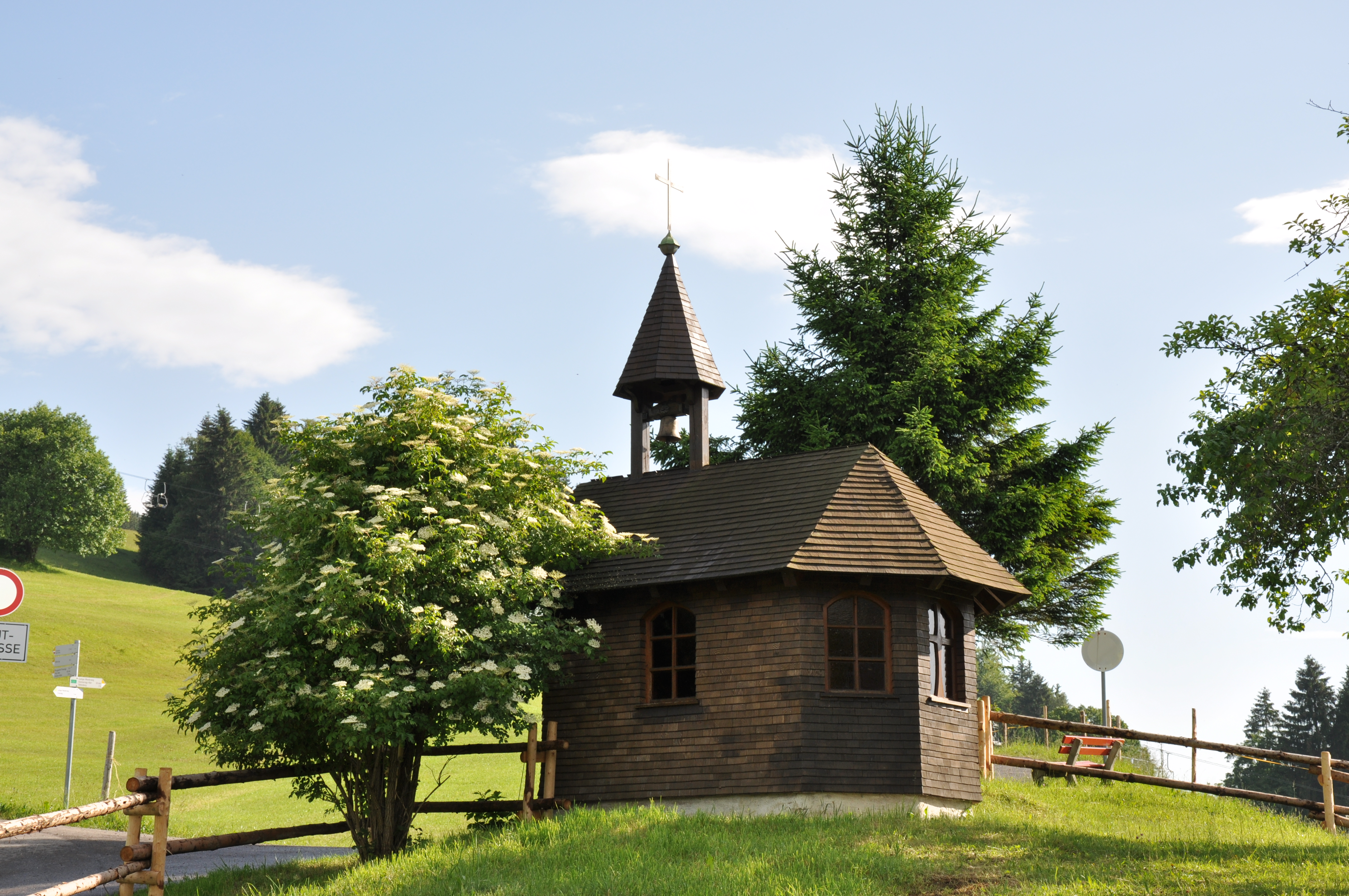 Asante-Christus-Kapelle (evangelische Wegekapelle), Rettenberg-Kranzegg, Allgäu